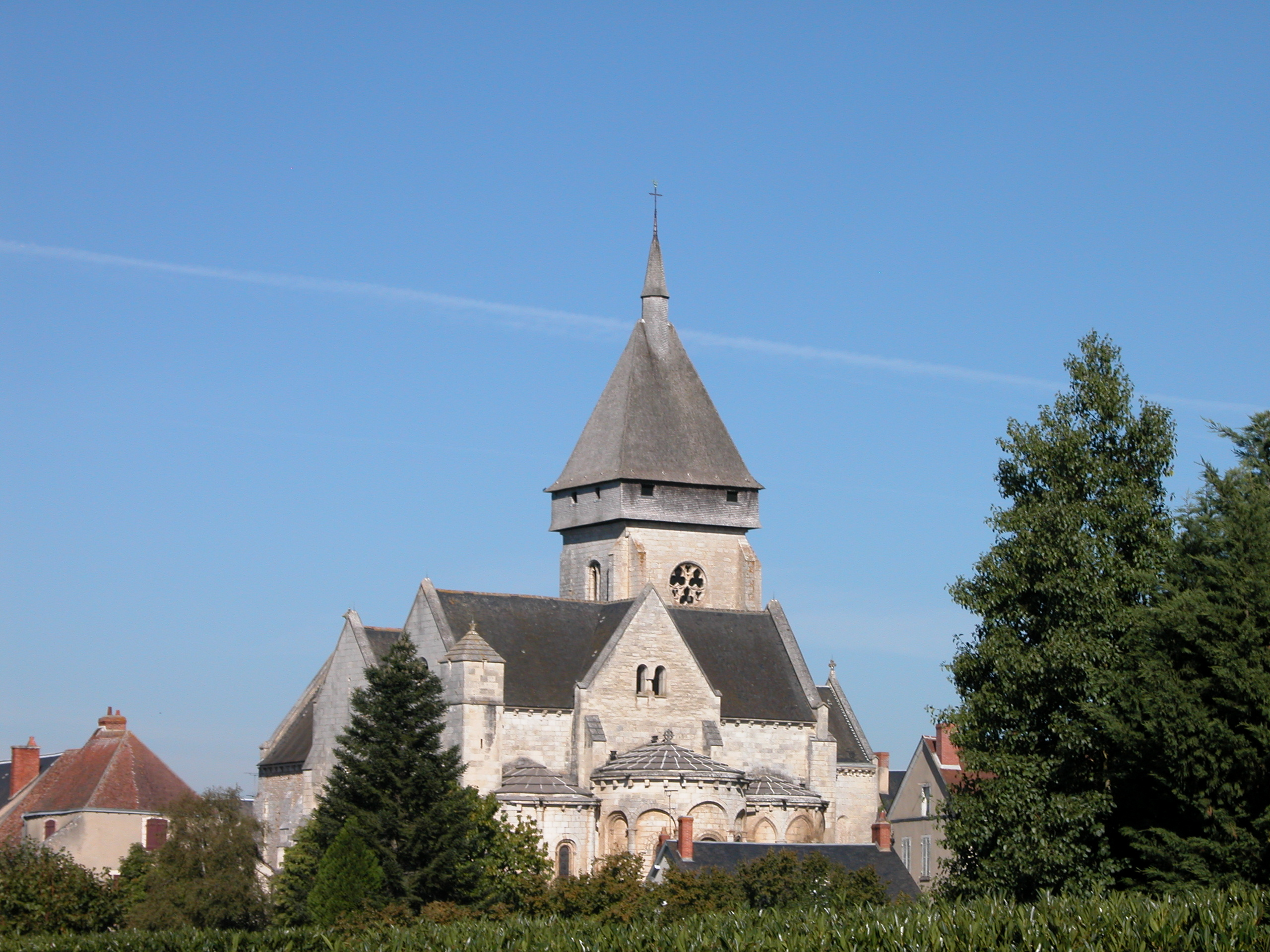 Vue d'ensemble de léglise de Saint-Marcel (Indre)